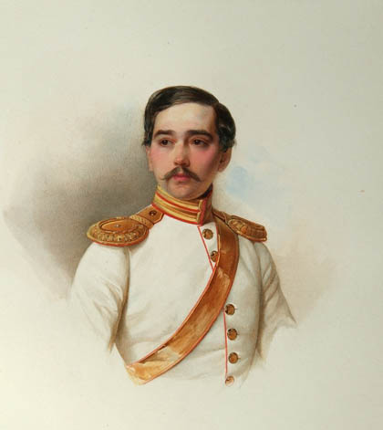 Князь Павел Павлович Голицын (1828—1882).